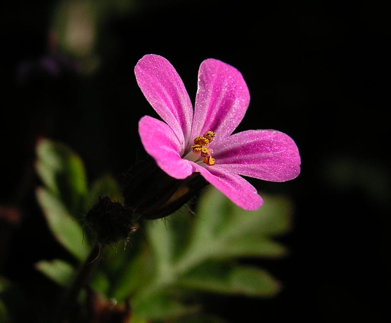 Ruprechtskraut bzw. Stinkender Storchschnabel (geranium robertianum), aufgenommen in der Nähe von Oberstdorf in den Allgäuer Alpen